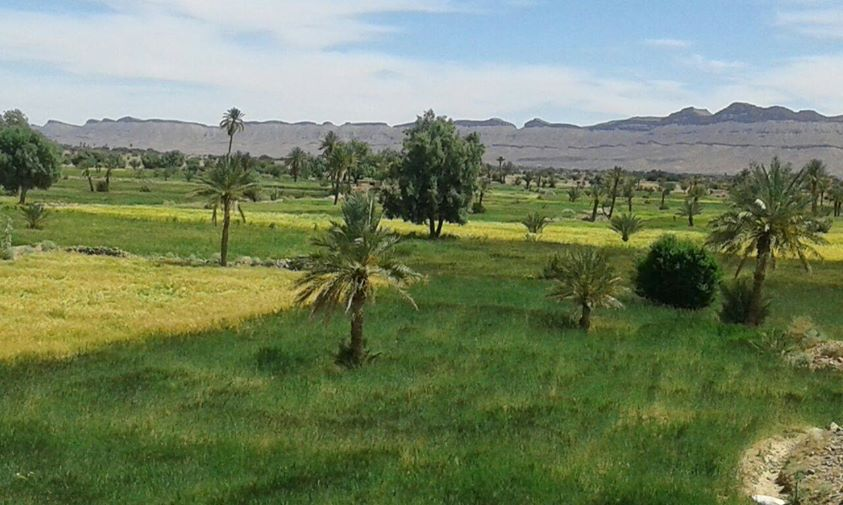 champ "igrane" de Maghnia